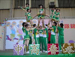 永春高中啦啦隊表演。